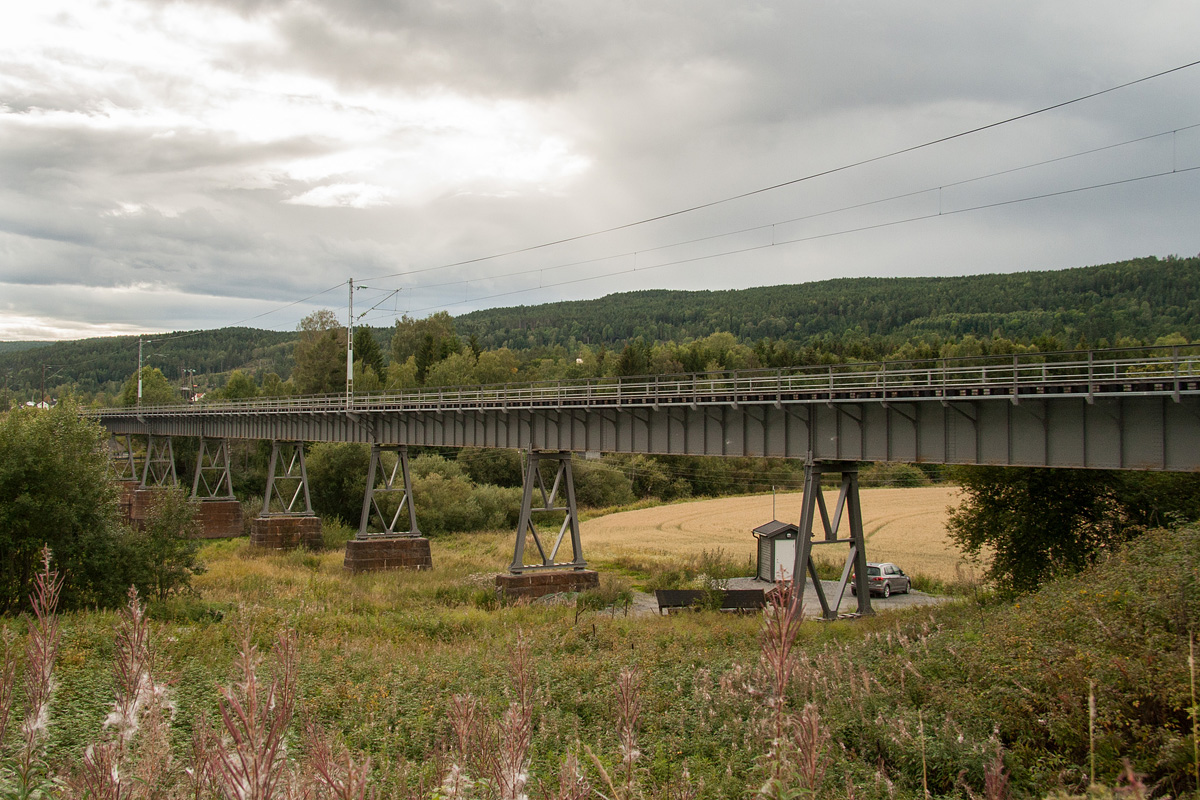 Bjerke bru på Randsfjordbanen sett fra siden.